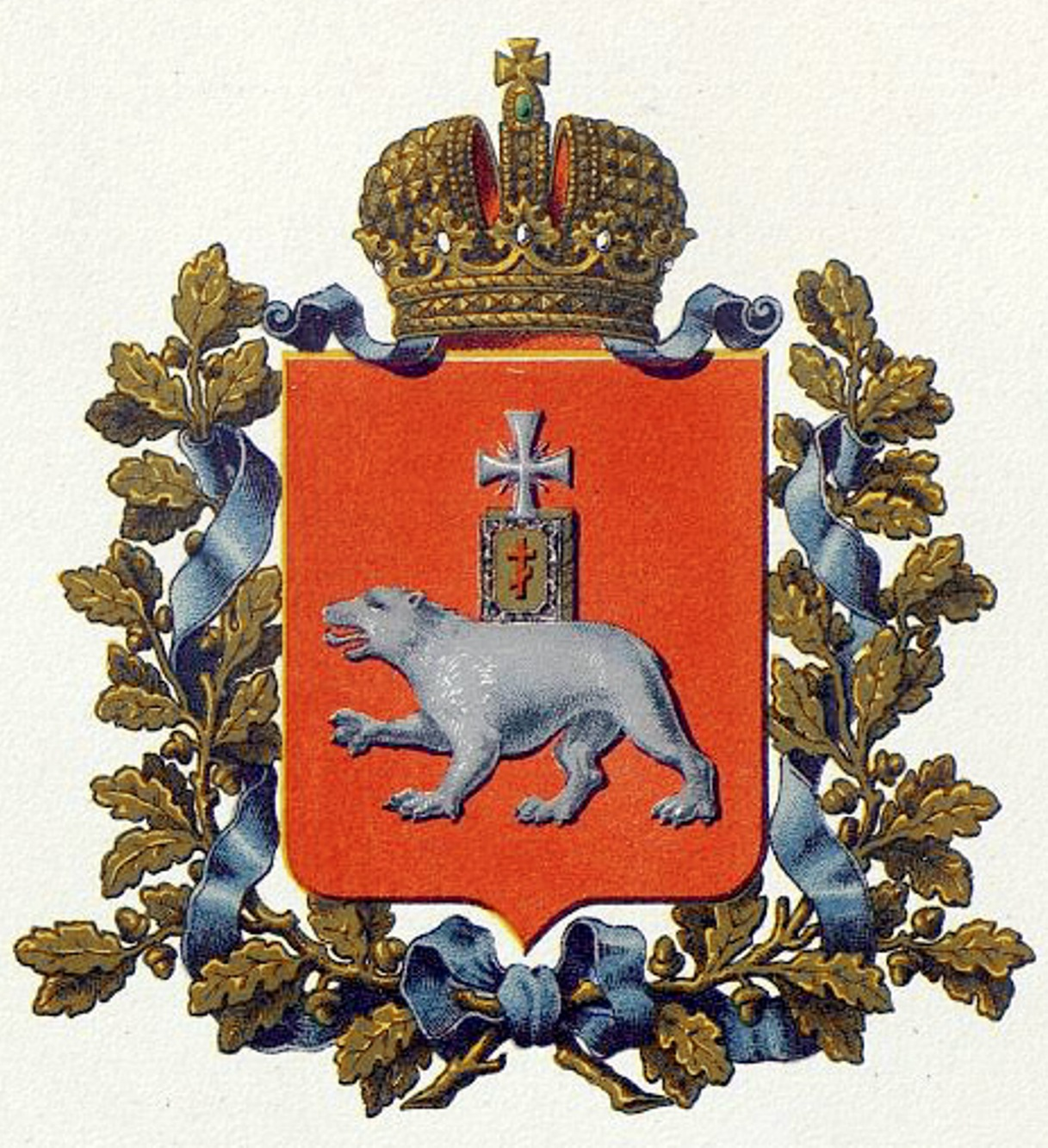 Official Russian Empire coat of arms Perm Governorate. Герб Российской Империи Пермской губернии в Гербовнике МВД. Утверждён Императором Всероссийским Александром Вторым в 1878 году.